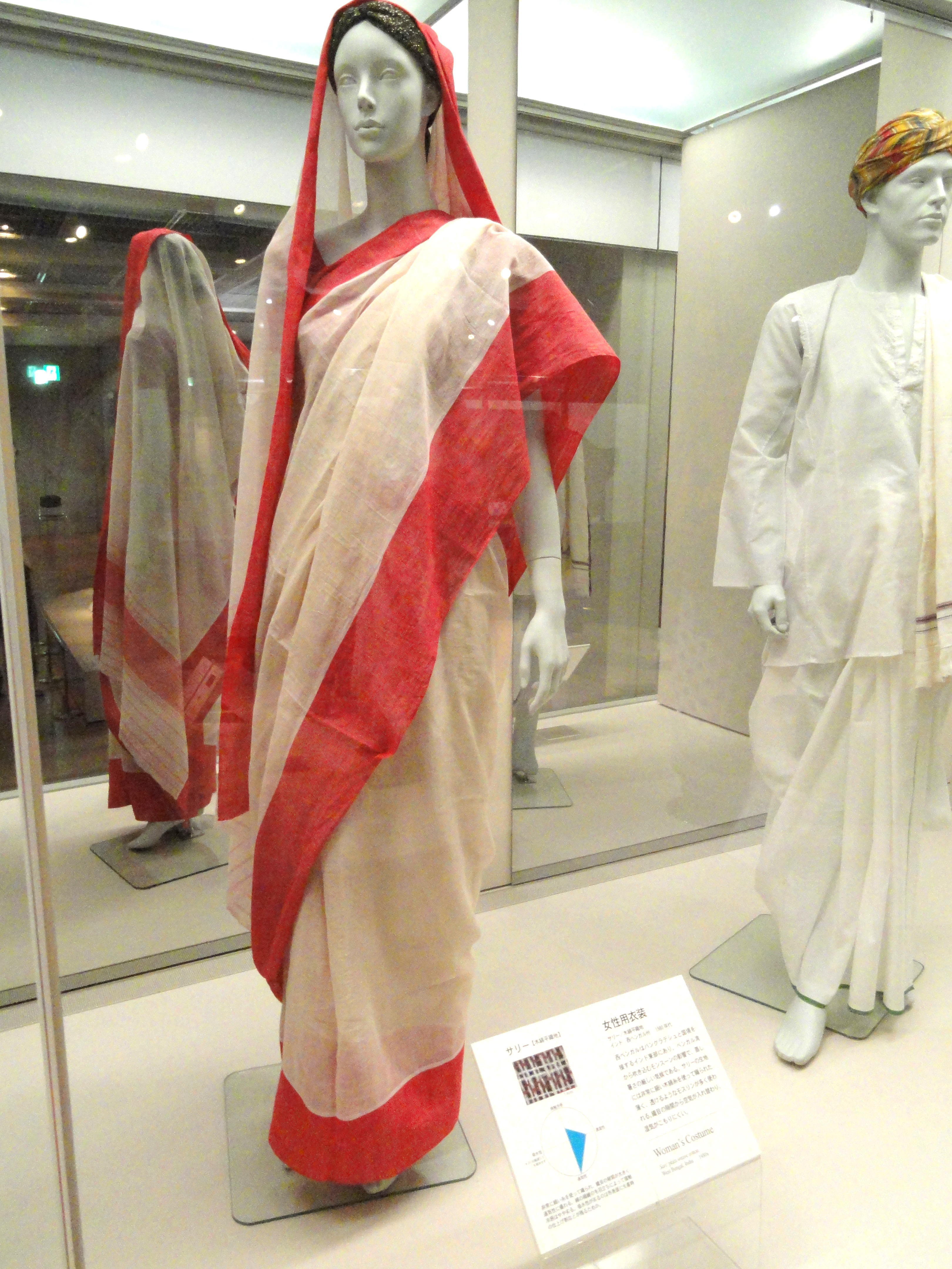 Exhibit in Bunka Gakuen Costume Museum, 3-22-7 Yoyogi, Shibuya-ku, Tokyo, Japan.